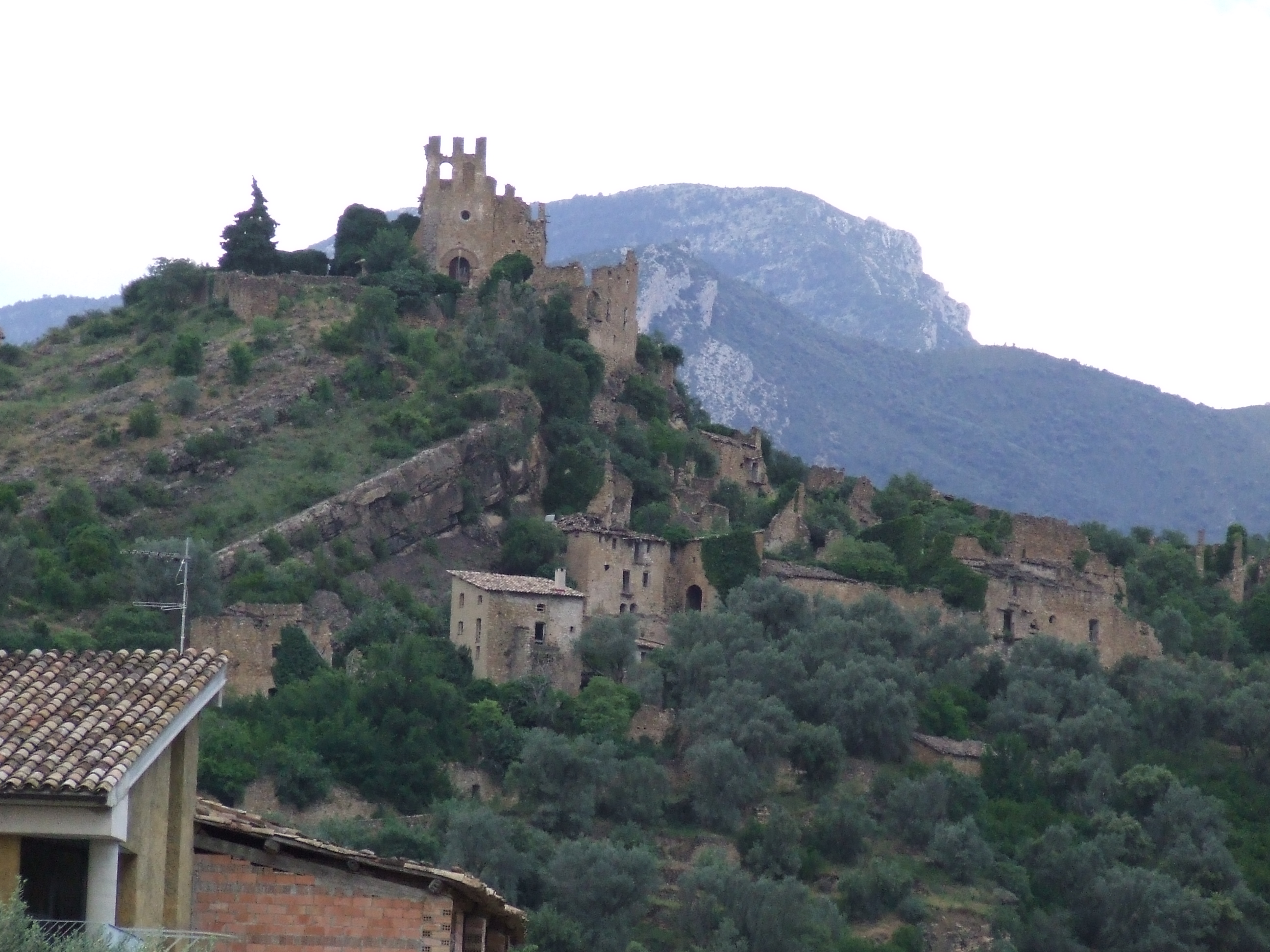 El poble vell d'Aramunt (Conca de Dalt, Pallars Jussà)